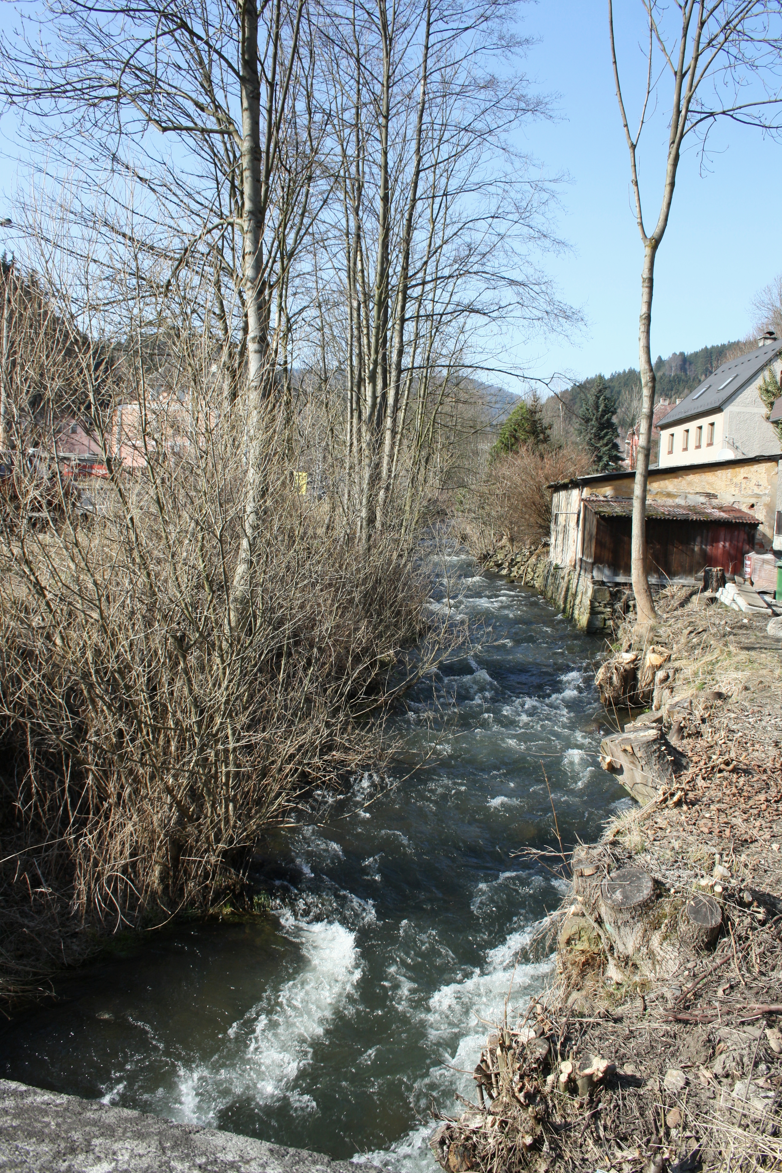 Horní Žďár - Jáchymovský potok